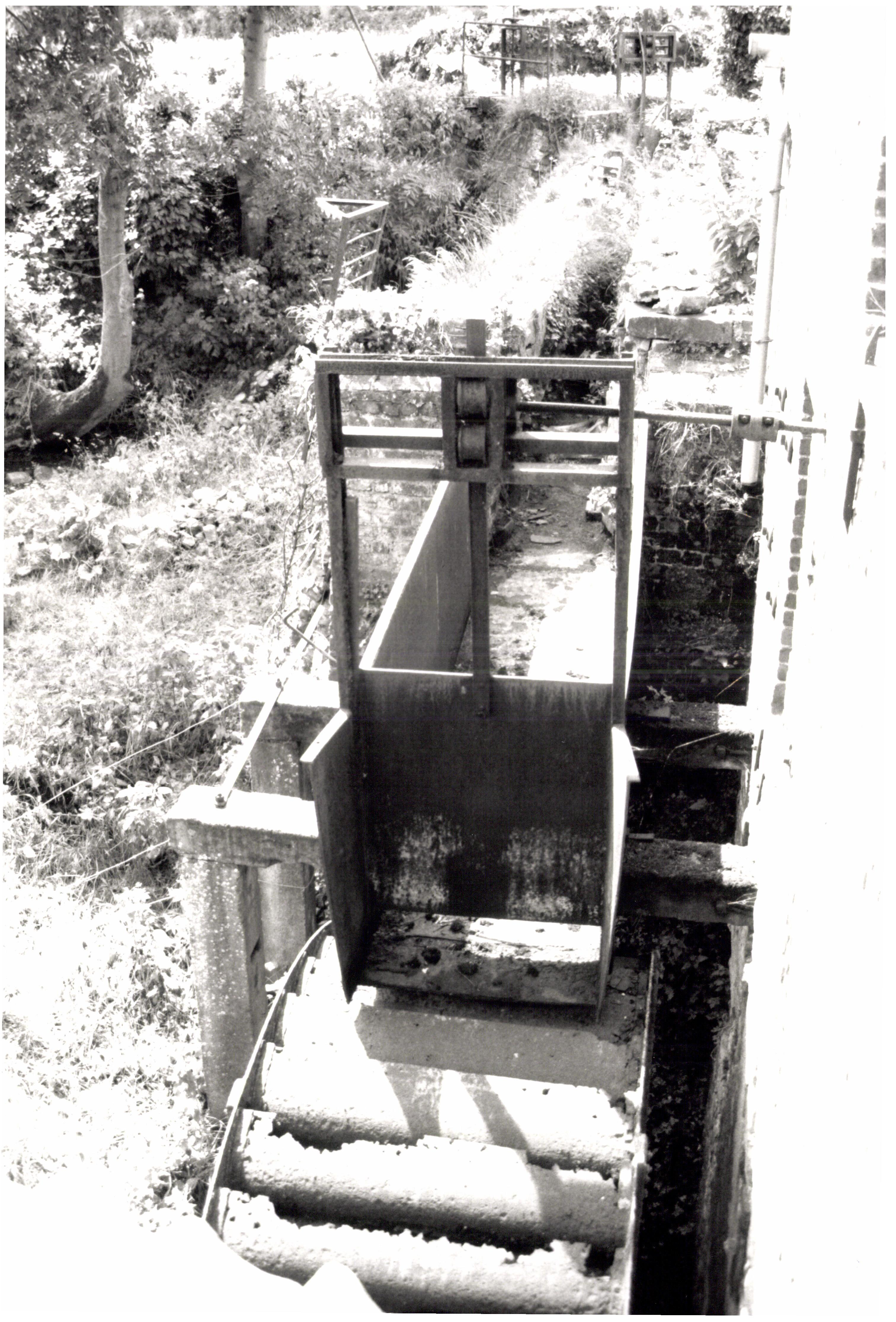 Watermolen Klapscheutmolen